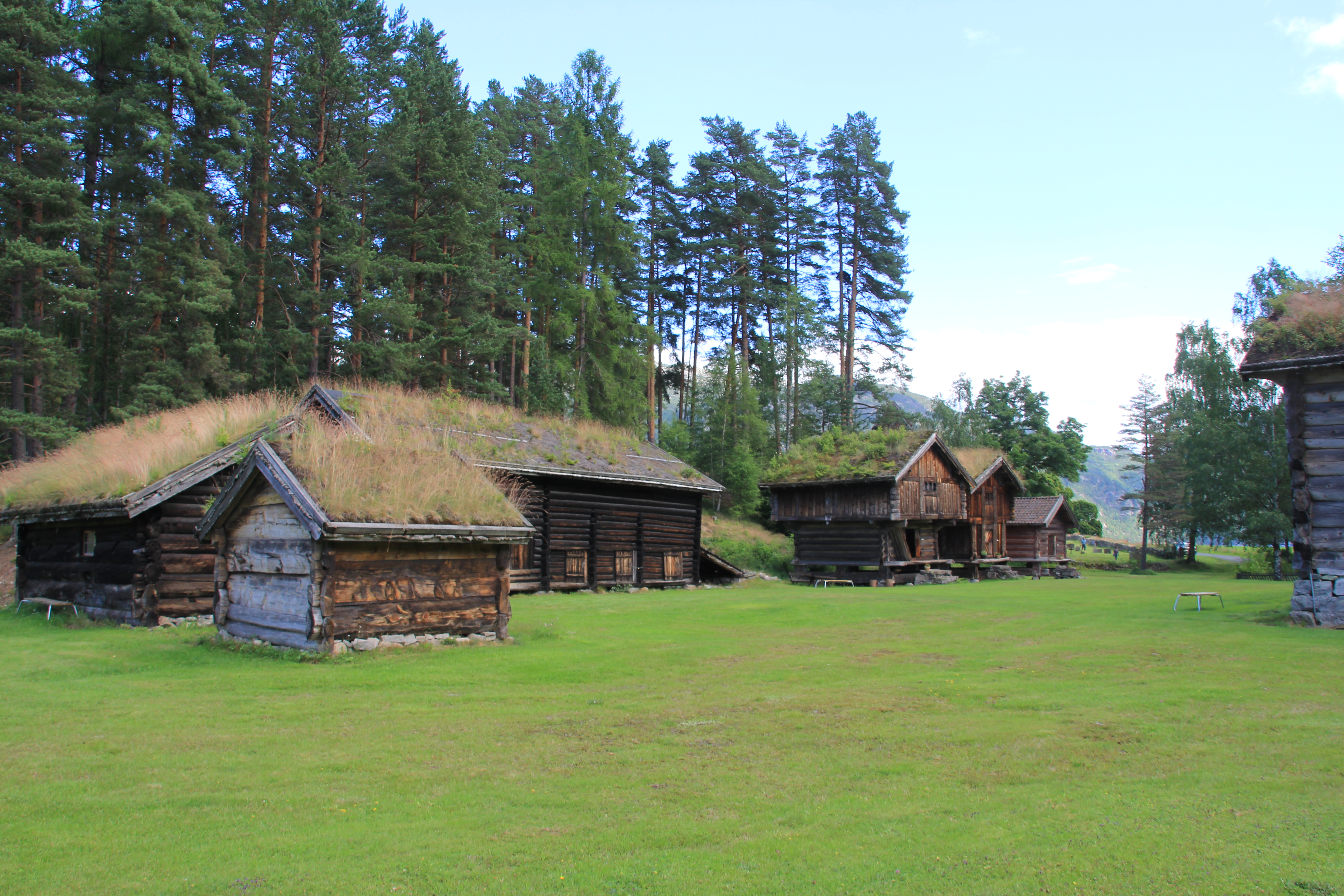 Kviteseid Bygdetun er et av Norges eldste bygdetun, og det åpnet i 1907.